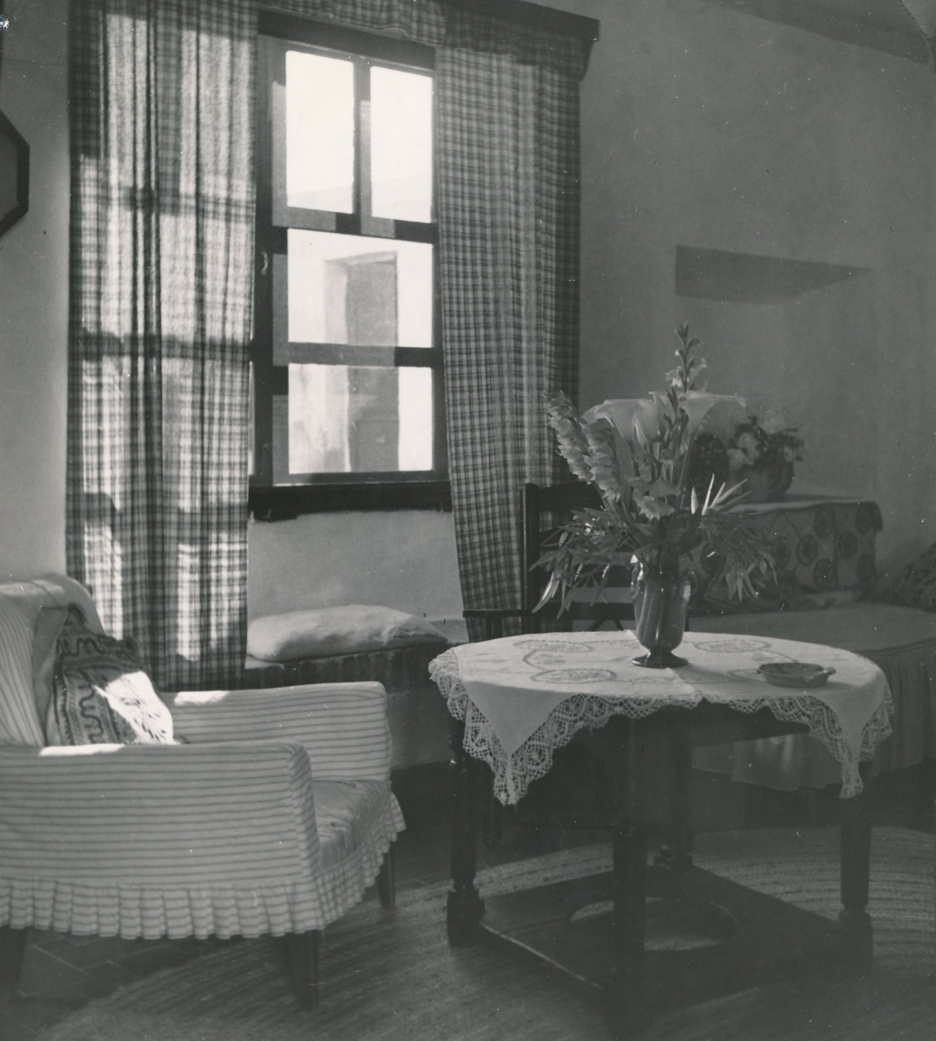 Torremolinos (Málaga), 1942 Procedencia: Archivo Fotográfico de la Dirección General de Turismo (1940-1992) Fotógrafo: Joaquín del Palacio Registro nº: 00604 Signatura: Caja 7 Fondos: Biblioteca de la Facultad de Empresa y Gestión Pública (Universidad de Zaragoza) Legado: Luis Fernández Fuster / E.S. Turismo Huesca